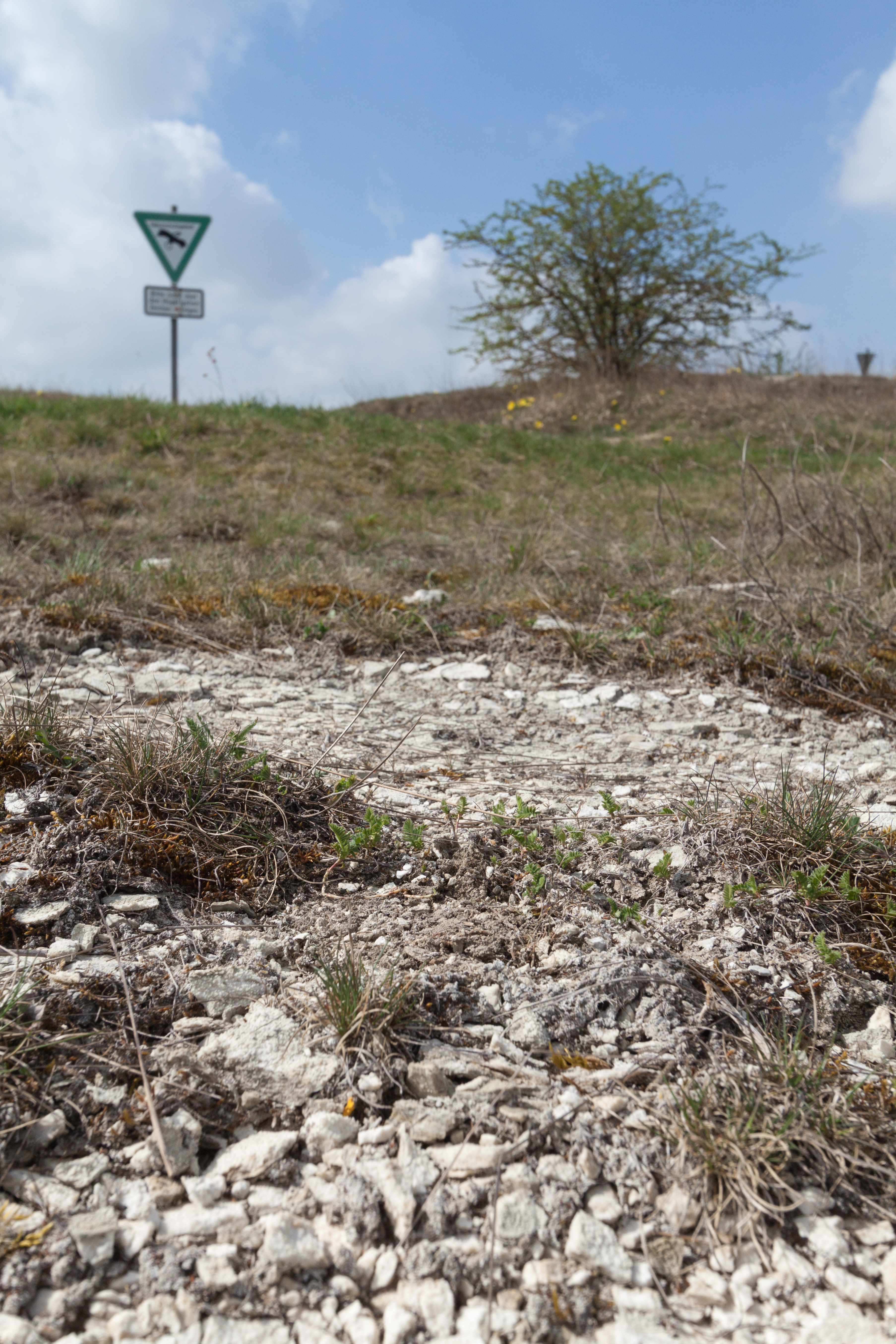 NSG „Külsheimer Gipshügel“ (NSG-00181.01), Bad Windsheim, West-Mittelfranken, Bayern, Bundesrepublik Deutschland. Steppentrockenrasen mit anstehemdem Gipsgestein.